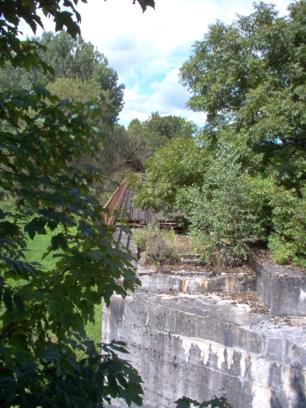 former train bridge Sigmaringendorf - Sigmaringen